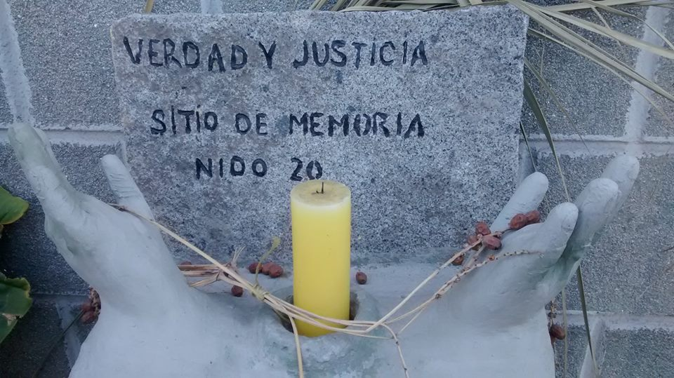 El Museo Centro Clandestino de detención y tortura "Nido 20", se encuentra ubicado en la comuna de La Cisterna, Chile. Usado por el Comando Conjunto, célula represora formada por elementos perteneciente a la Fuerza Aérea y Carabineros de Chile.